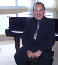 Isidro Infante.Gira artística en Miami, 2010